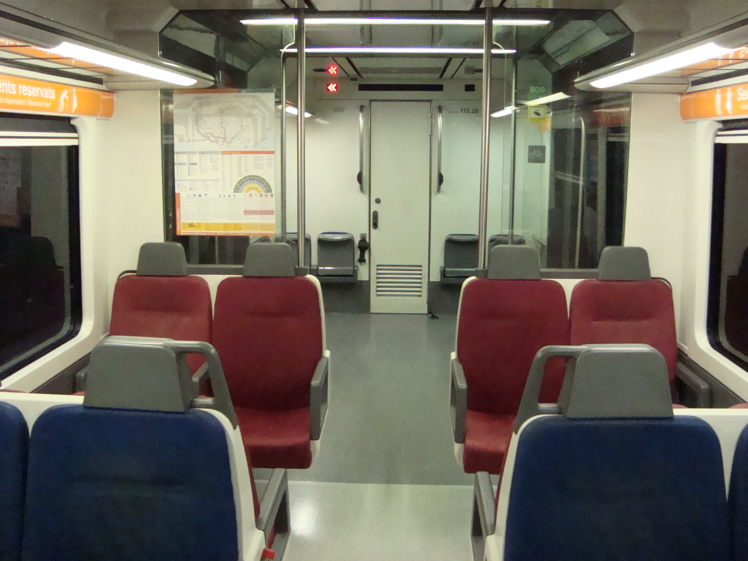 L'interior d'un tren dels FGC (Catalunya)